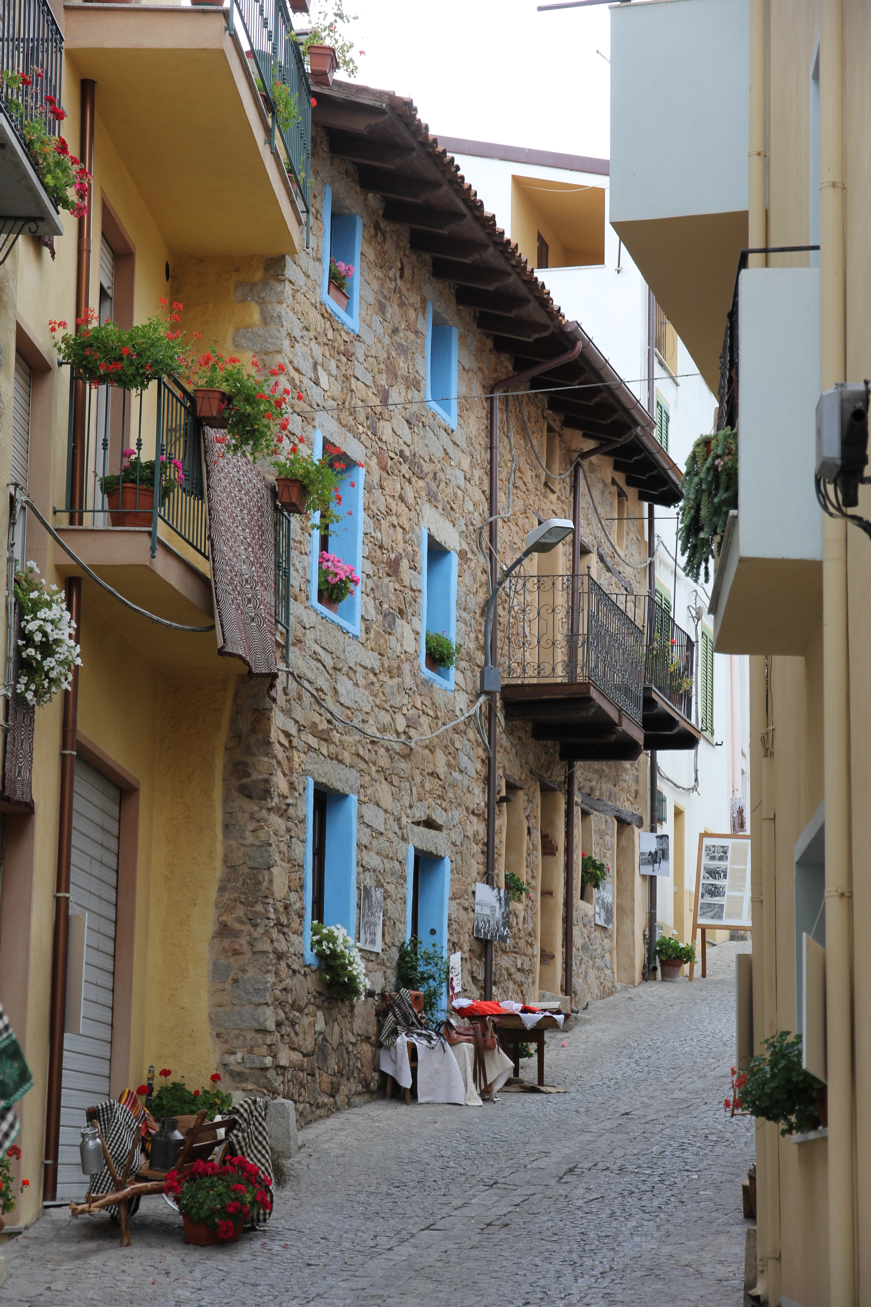 Fonni